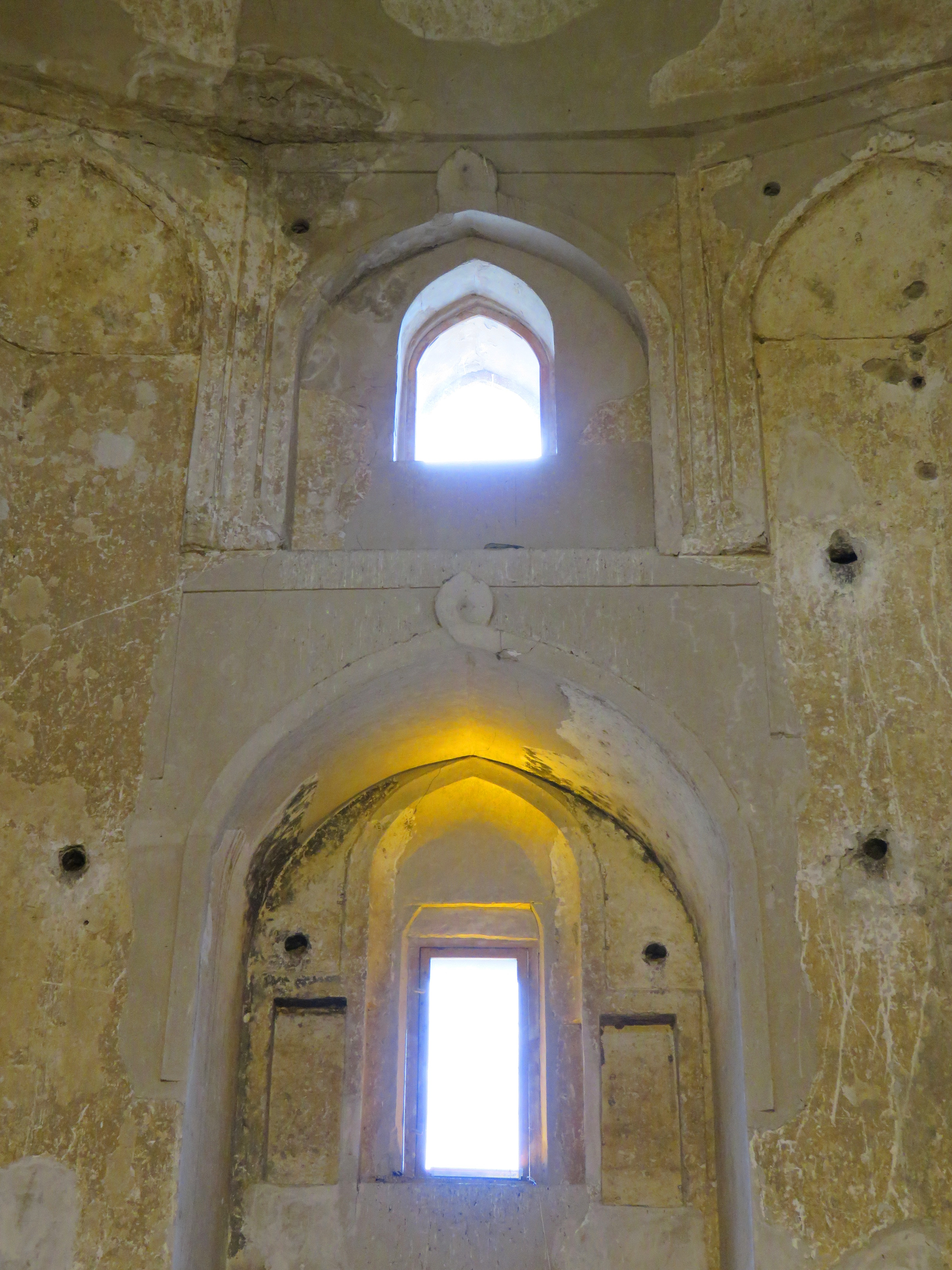 گنبد گبری